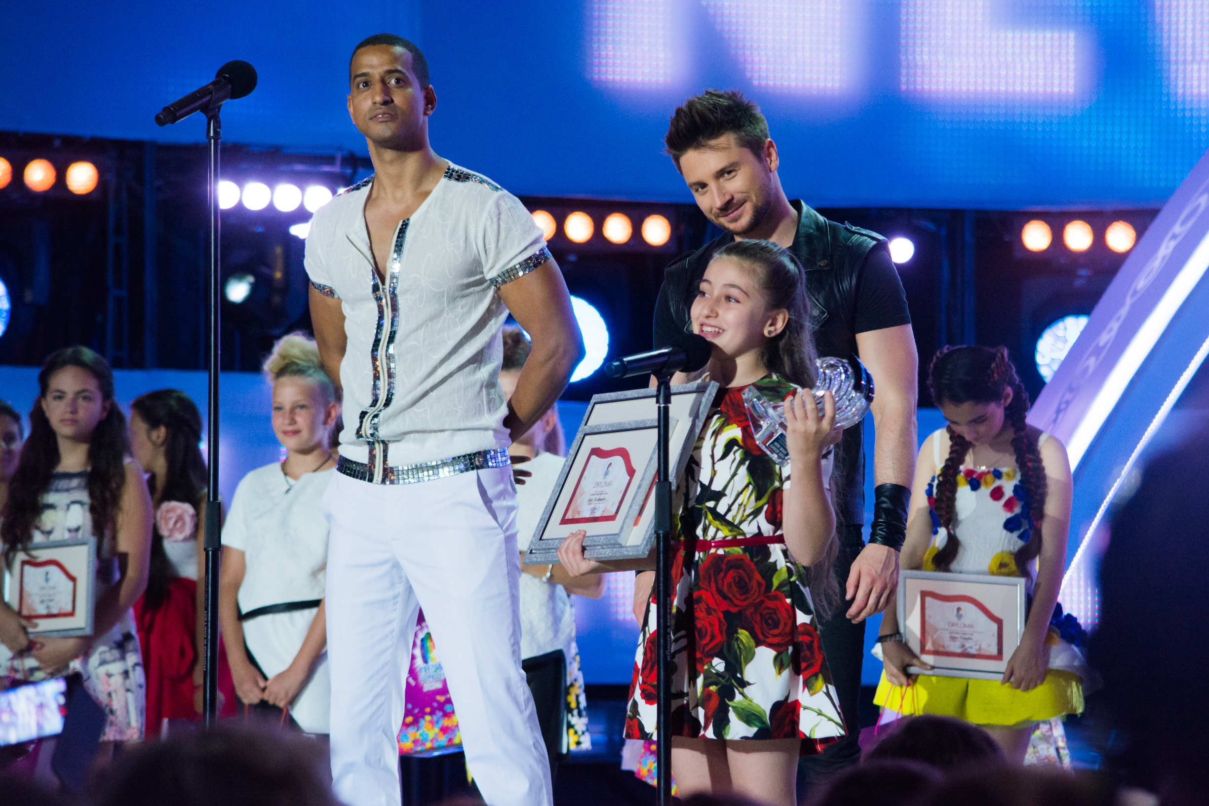 Мэри Кочарян на Детской Новой волне 2015